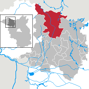 Wittstock/Dosse in Brandenburg (Country) - District Ostprignitz-Ruppin